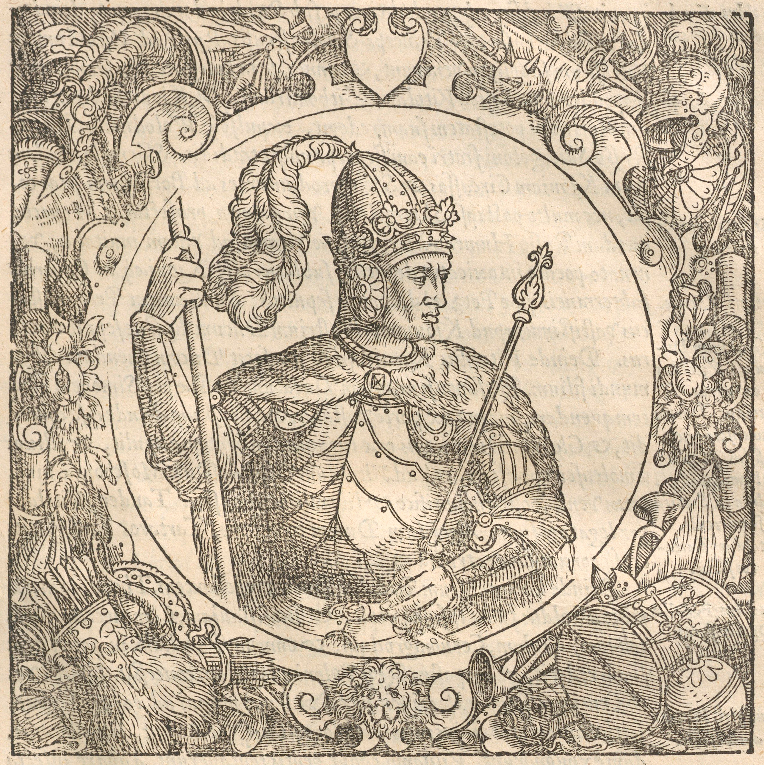 Беларуская (тарашкевіца): Партрэт Вітаўта Вялікага (Vitaŭt Vialiki)